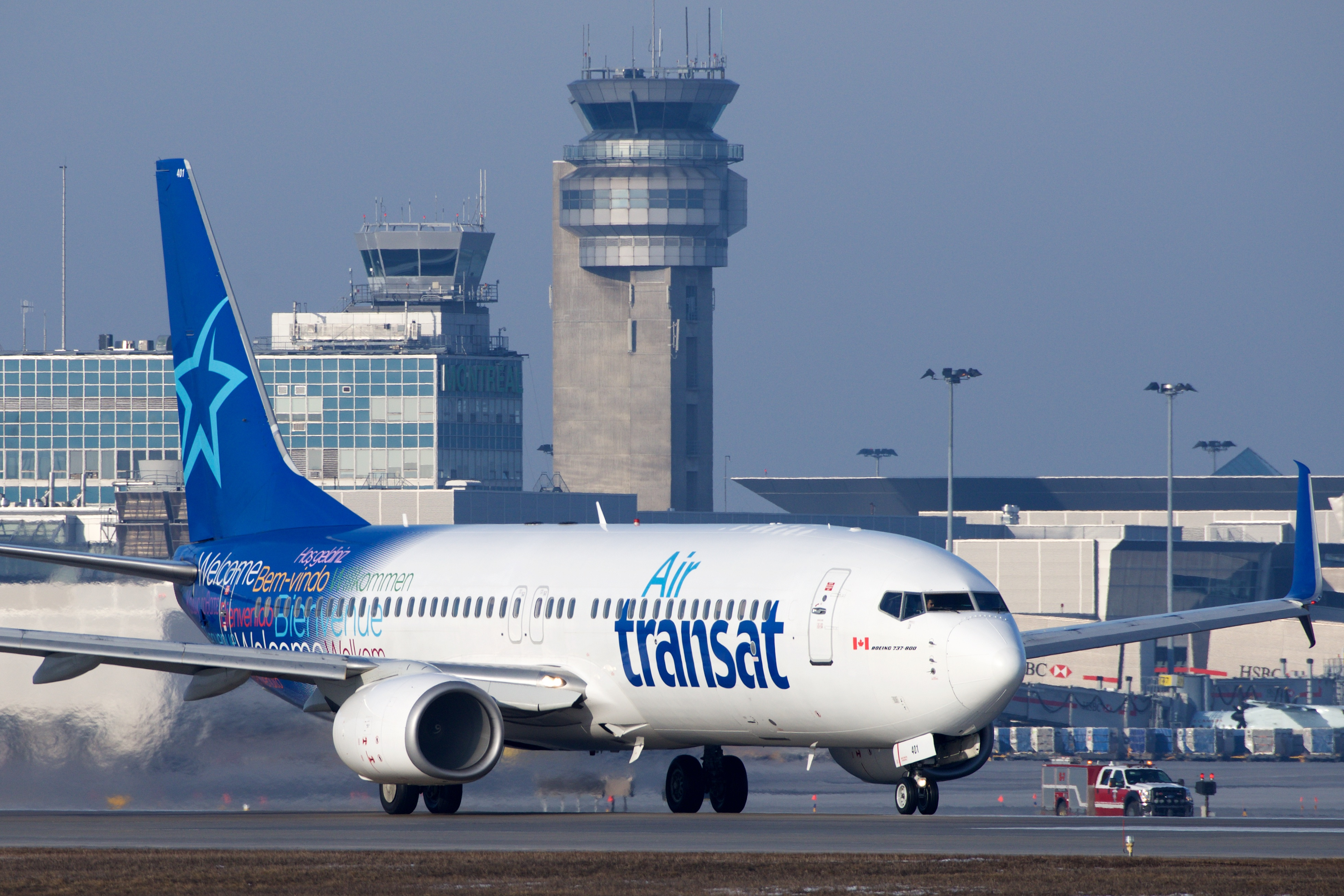 Departure, YUL.